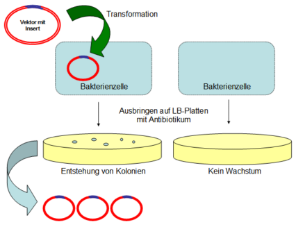 Transformation von Plasmid-DNA in kompetente E. coli-Zellen; anschließende Selektion durch Antibiotika spezifischer Fotograf/Zeichner: Andymuc spezifisches Datum: 05.06.2005